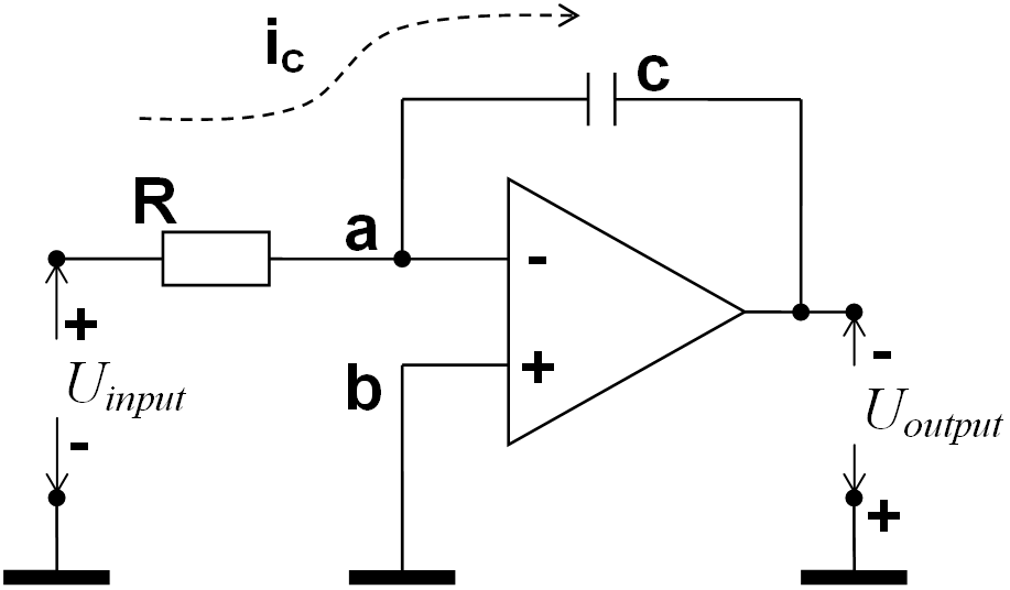 Схема на интегратор с идеален операционен усилвател.